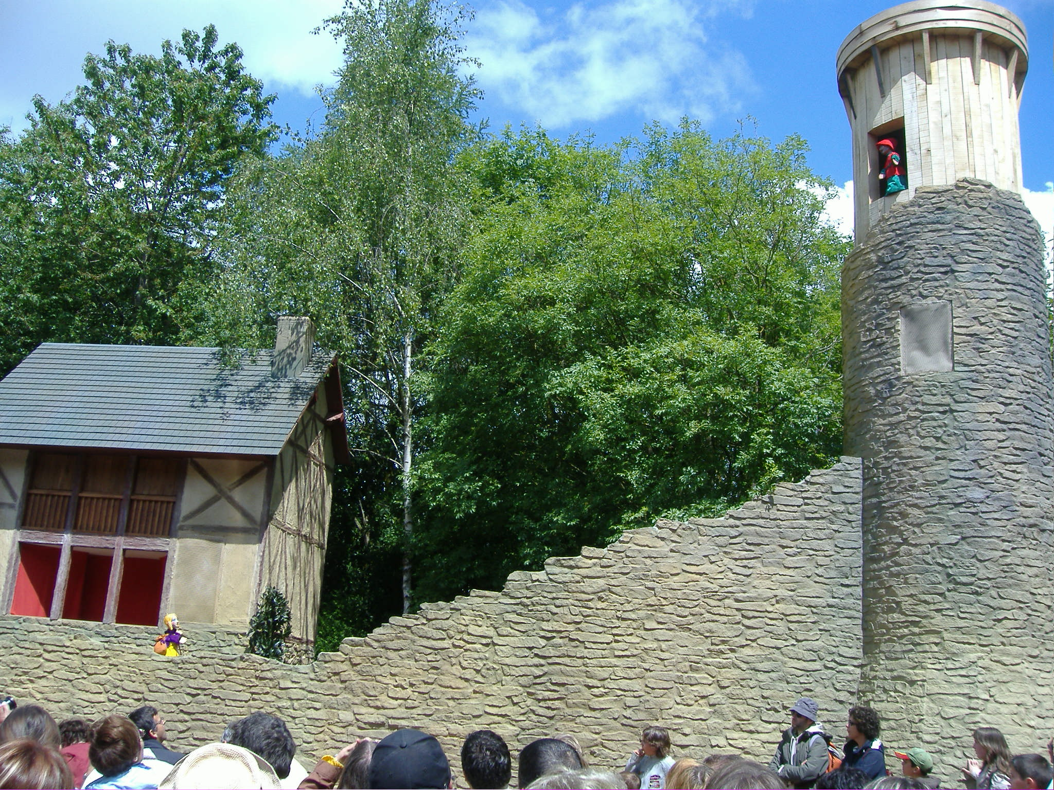 Une partie du décor du spectacle de marionnette 'la légende de Martin' au Grand parc du Puy du Fou®